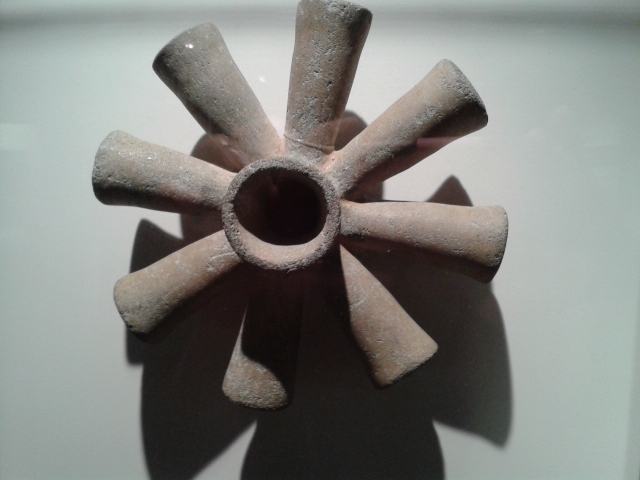 Remate de bastón hecho de andesita, de la cultura de la Región Central de Costa Rica, periodo precolombino.